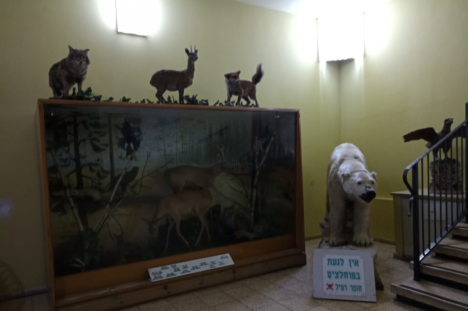 גן החי